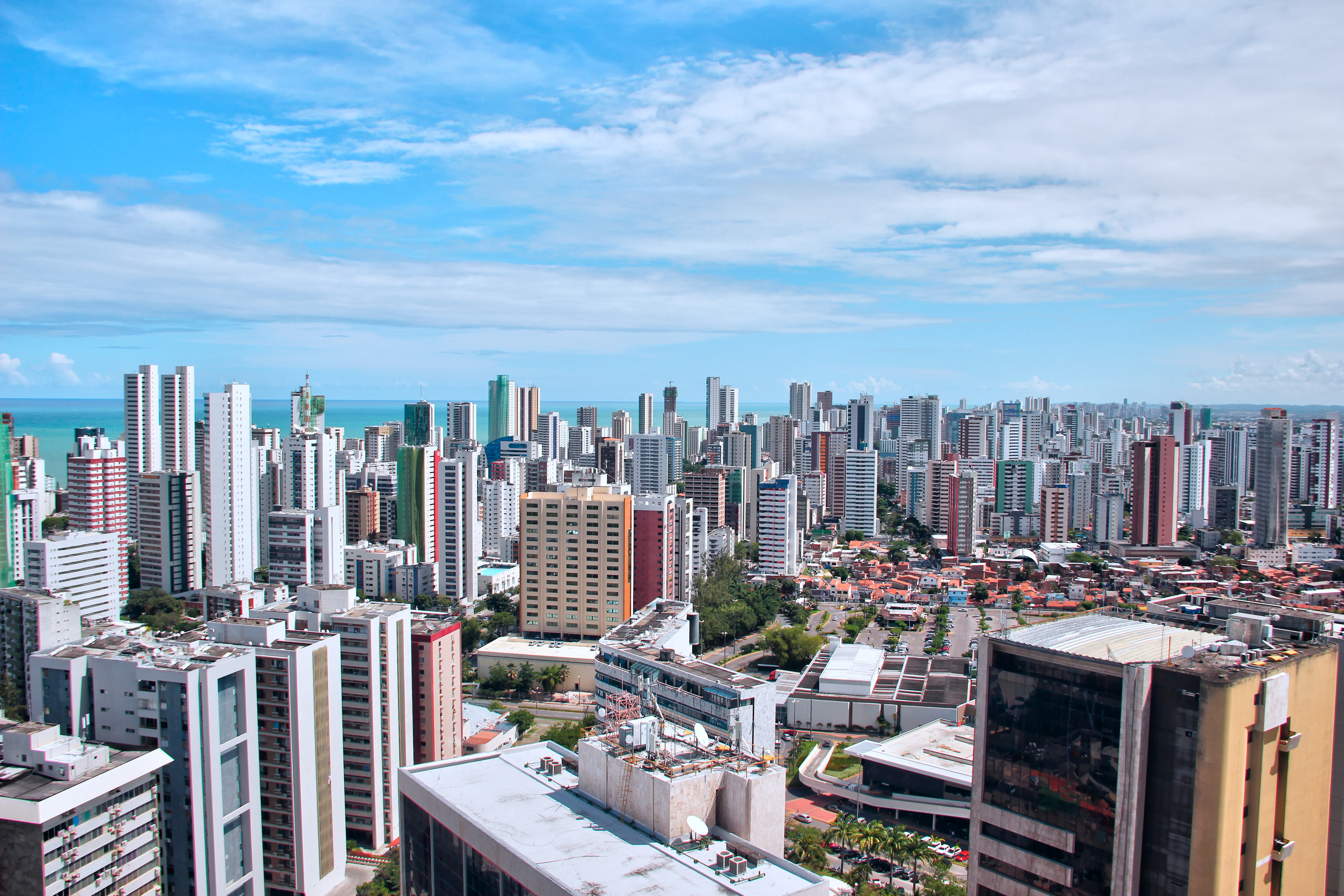 Fotos 25 de Outubro 2013